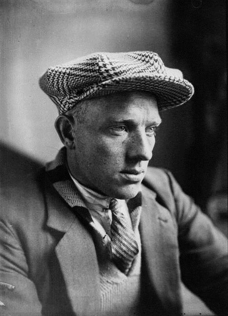 Jef Demuysere lors du Tour de France 1929